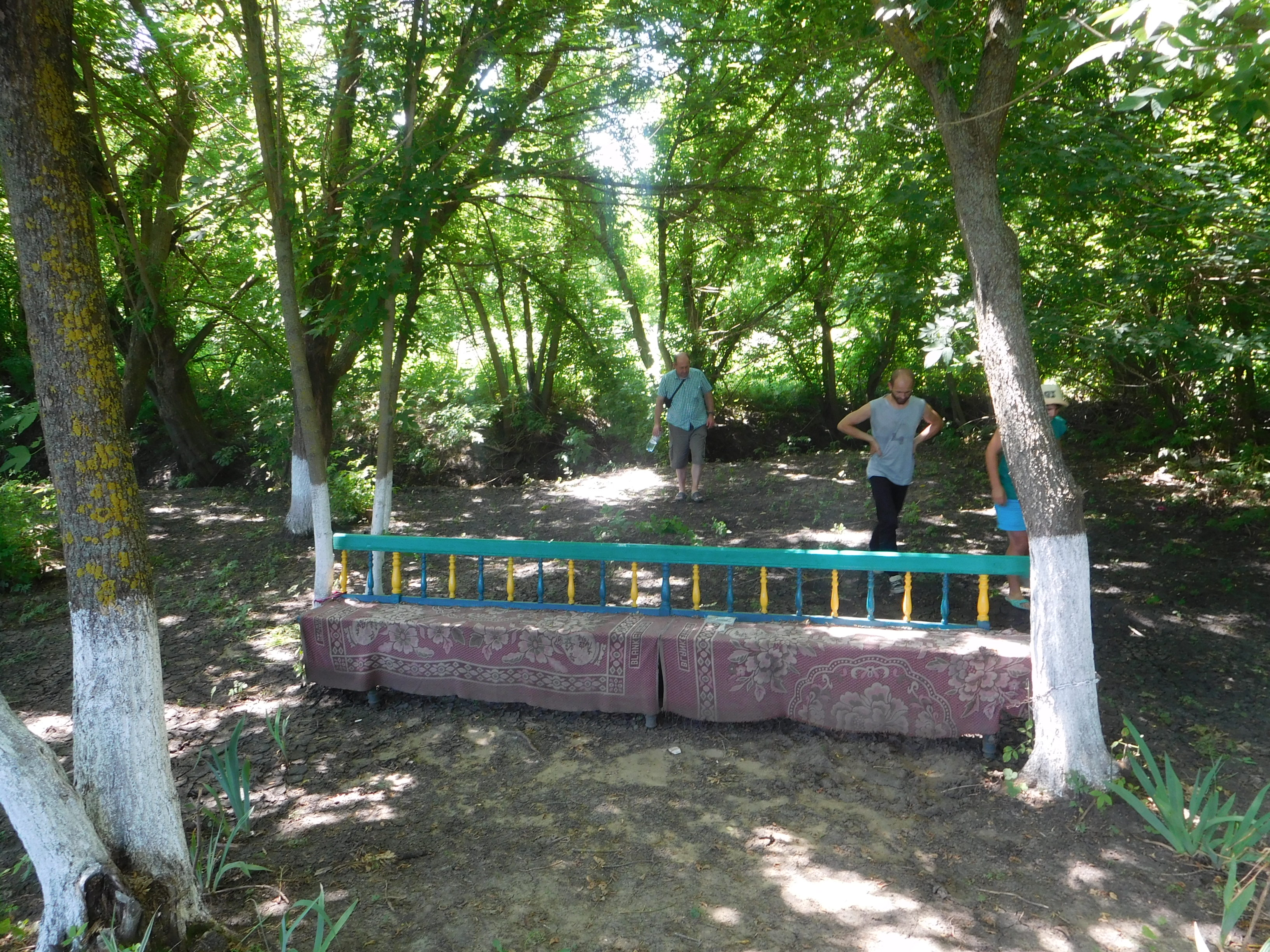 Місце для відпочинку на березі річки Кодима в с. Мошняги, Балтська міська громада